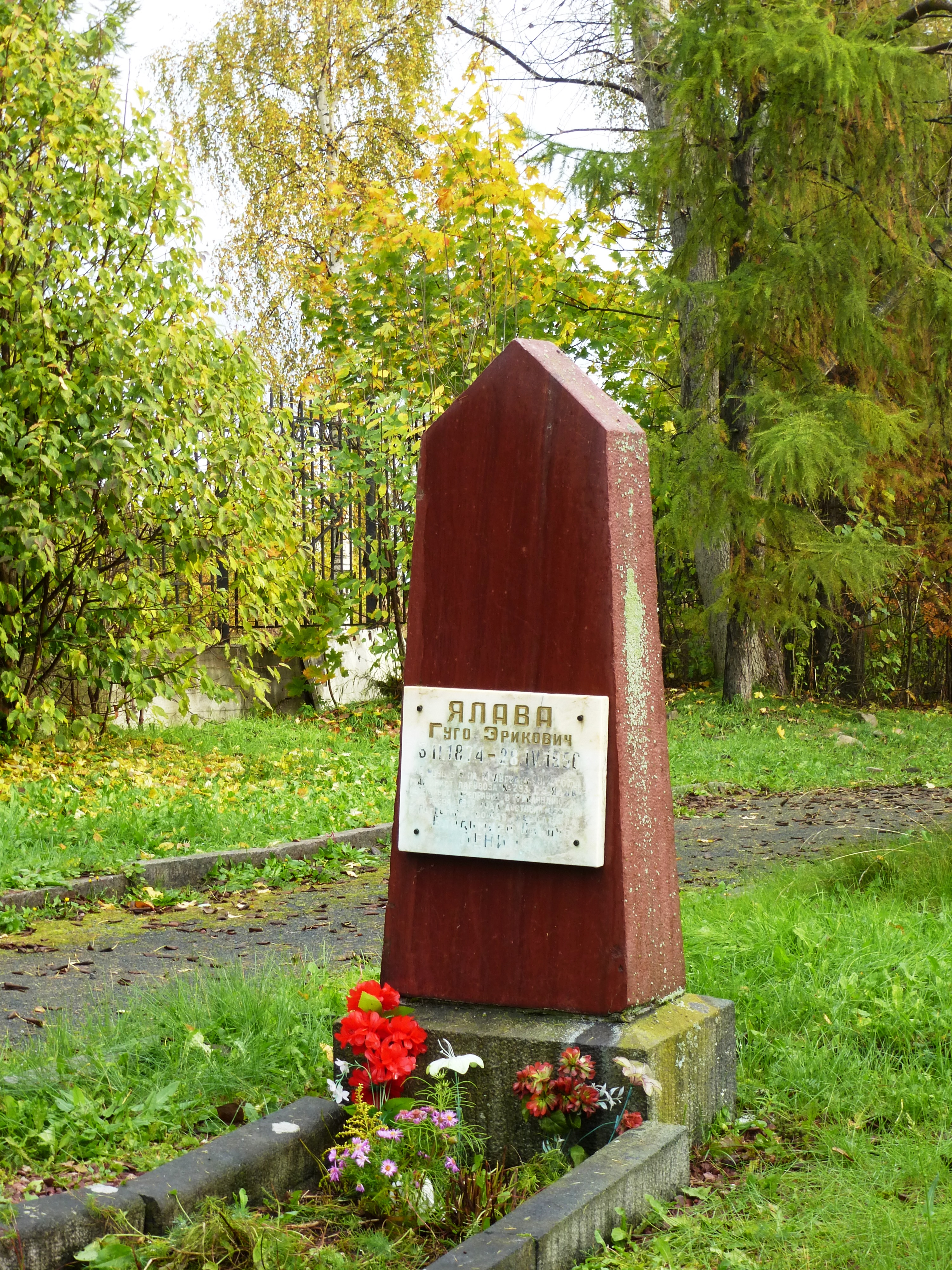 Памятник на могиле революционера-большевика Ялавы Г.Э. на Сулажгорском мемориальном городском кладбище в Петрозаводске.